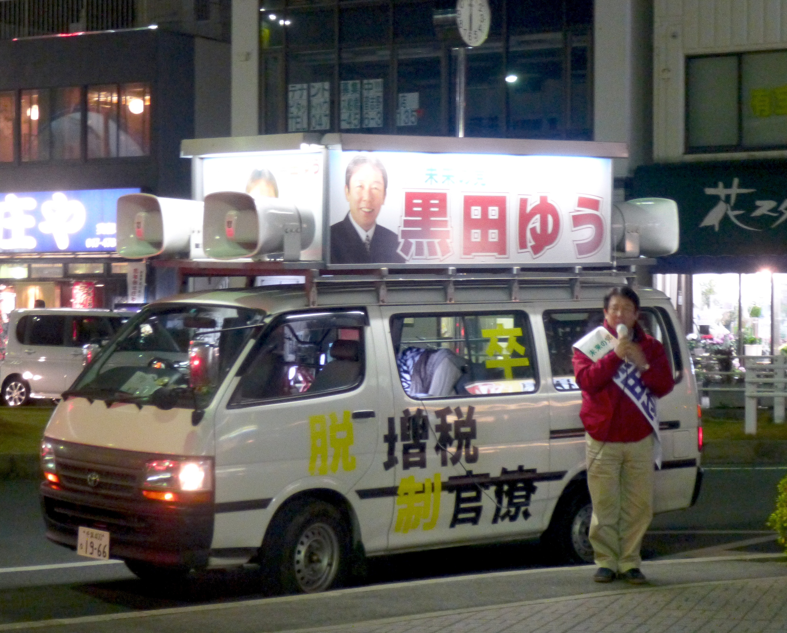 黒田 雄（くろだ ゆう [Kuroda Yū]、1959年3月22日 - ）は、日本の政治家。